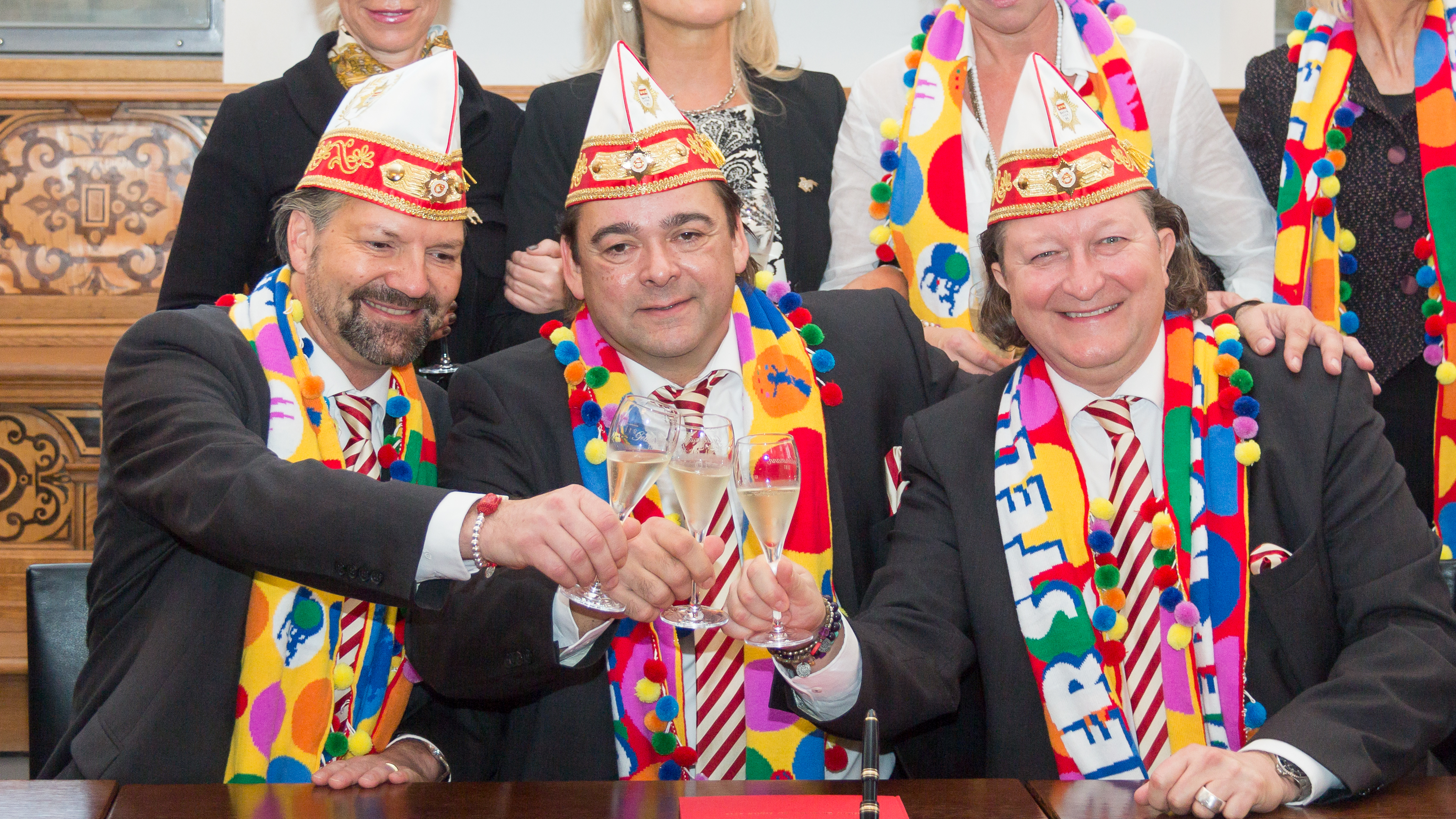 Kölner Dreigestirn von der Prinzen-Garde Köln 1906 e.V. Vertragsunterzeichnung des Sessionsvertrages im Senatssaal und Empfang durch die Oberbürgermeisterin, vertreten durch die Bürgermeisterin Elfi Scho-Anttwerpes, im Hansasaal des Historischen Rathauses von Köln